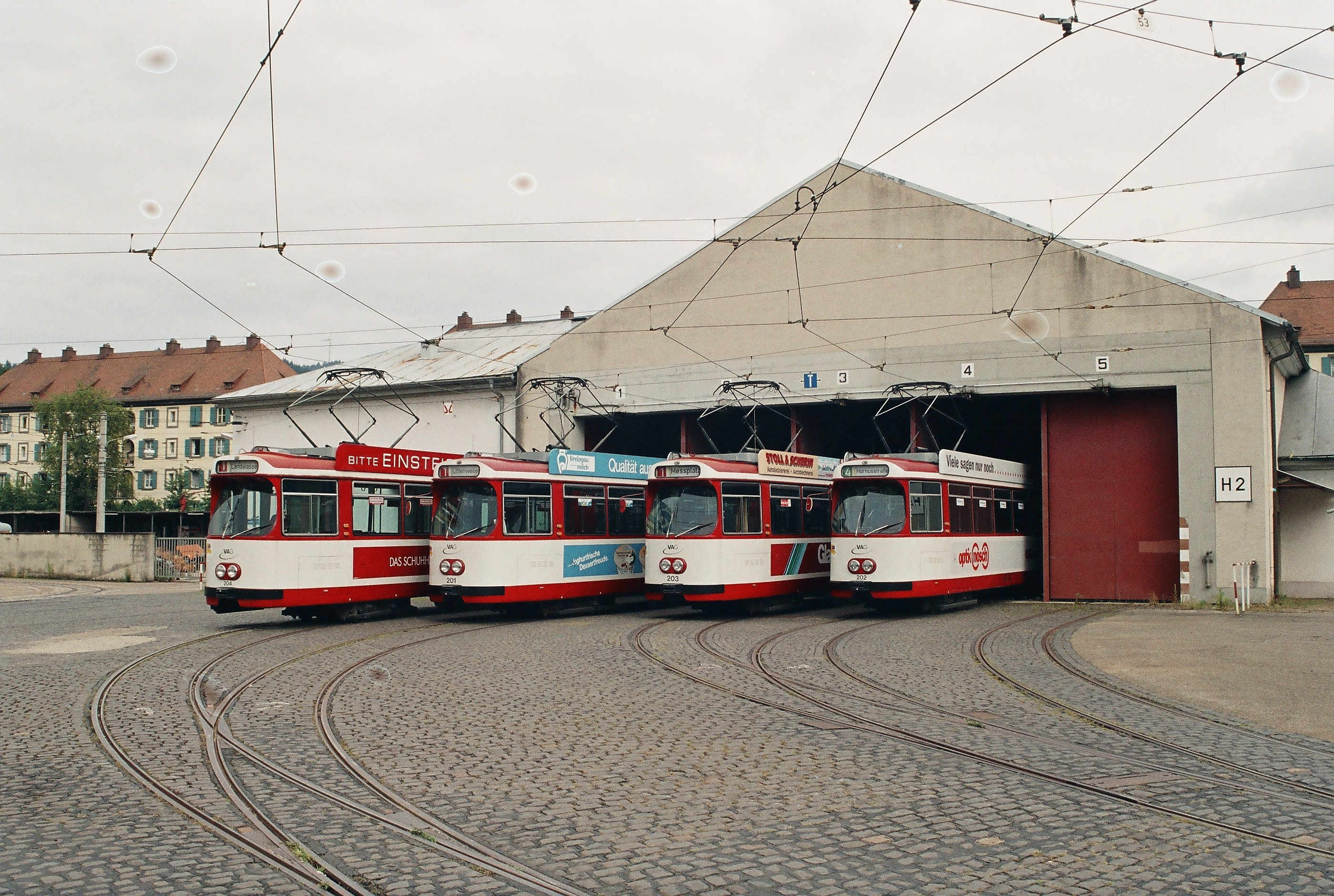 die 4 GT8 Geamtic vor dem inzwischen abgerissenen Betriebshof Nord